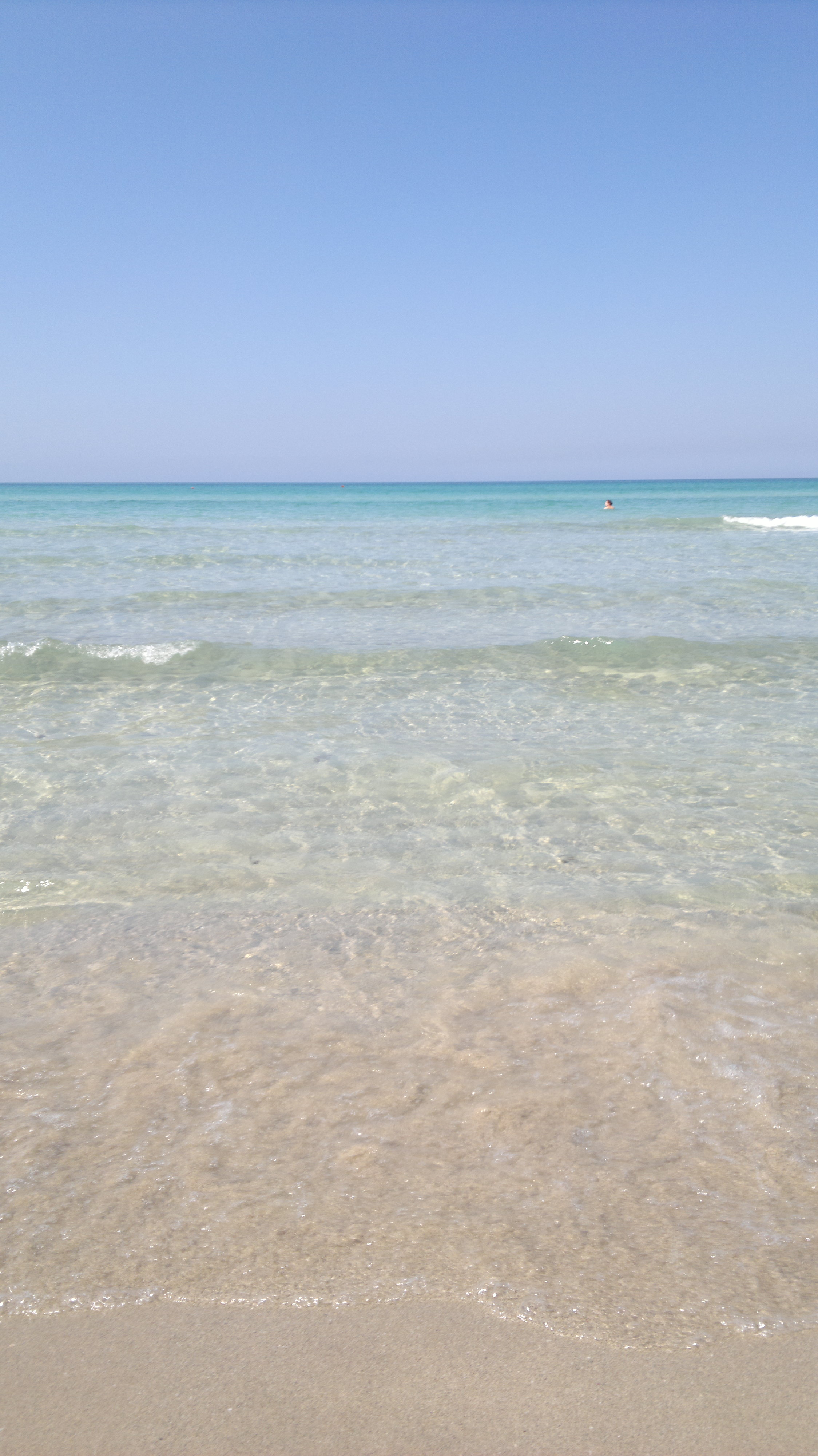 il favoloso mare ionico a Pescoluse